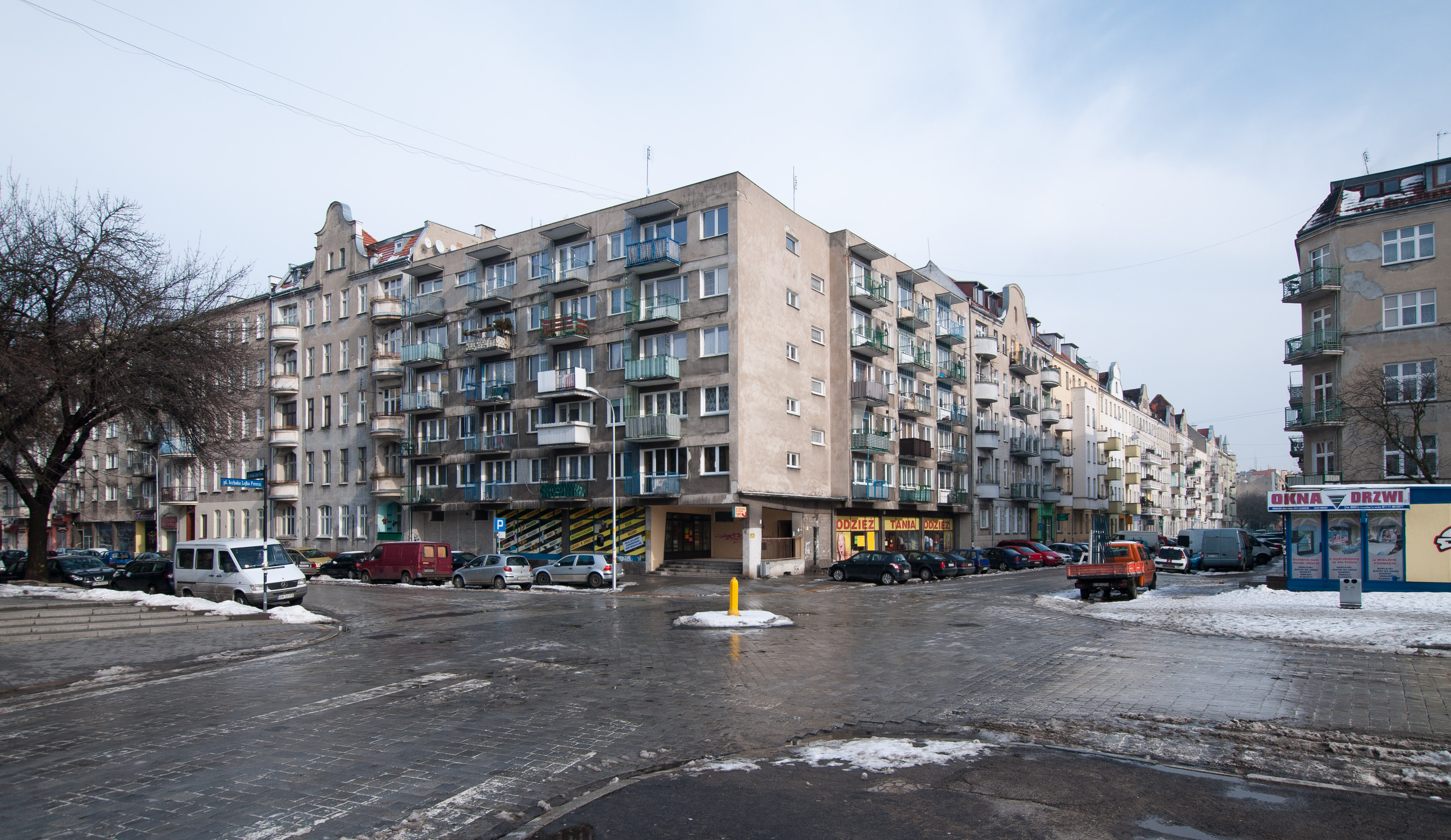 Ulica Icchaka Lejba Pereca we Wrocławiu, skrzyżowanie z ul. Szczęśliwą (północny narożnik pl. Pereca).